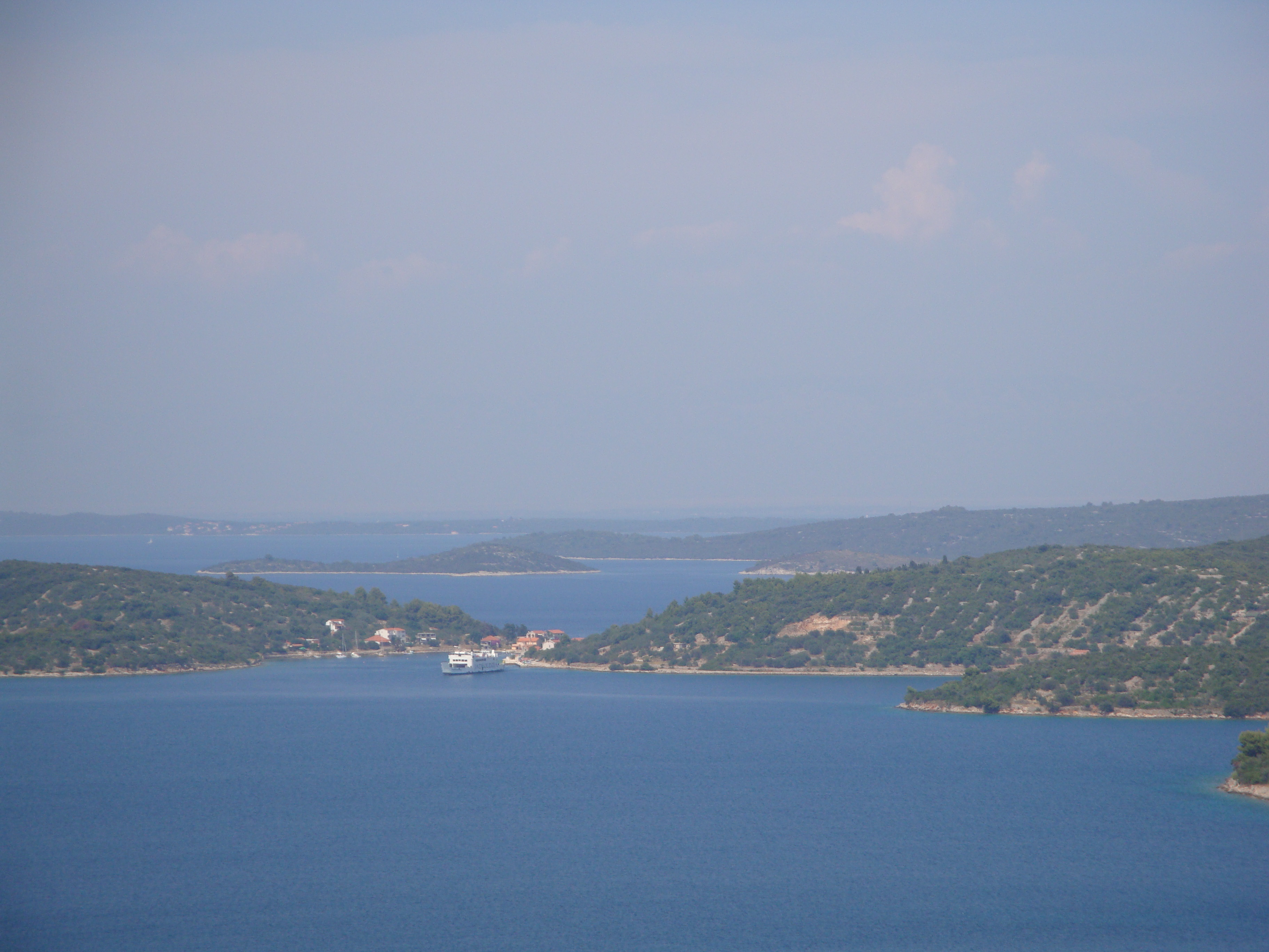 otok Rava